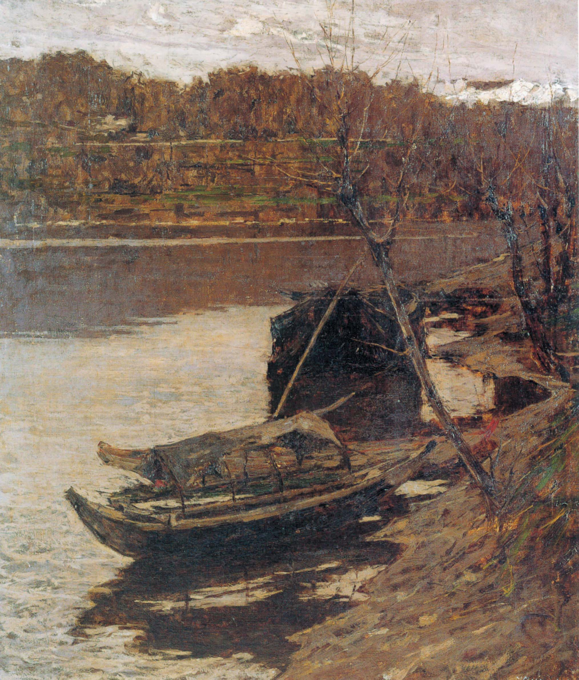 Barche sulla spiaggia